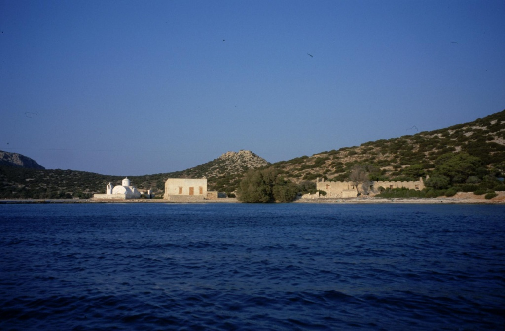 Panorama von Alimia